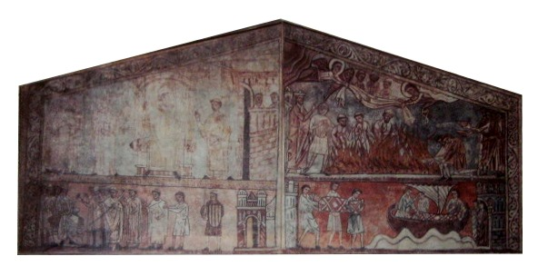 Un dipinto rappresentante Fruttuoso, Augurio, Eulogio da Tarragona